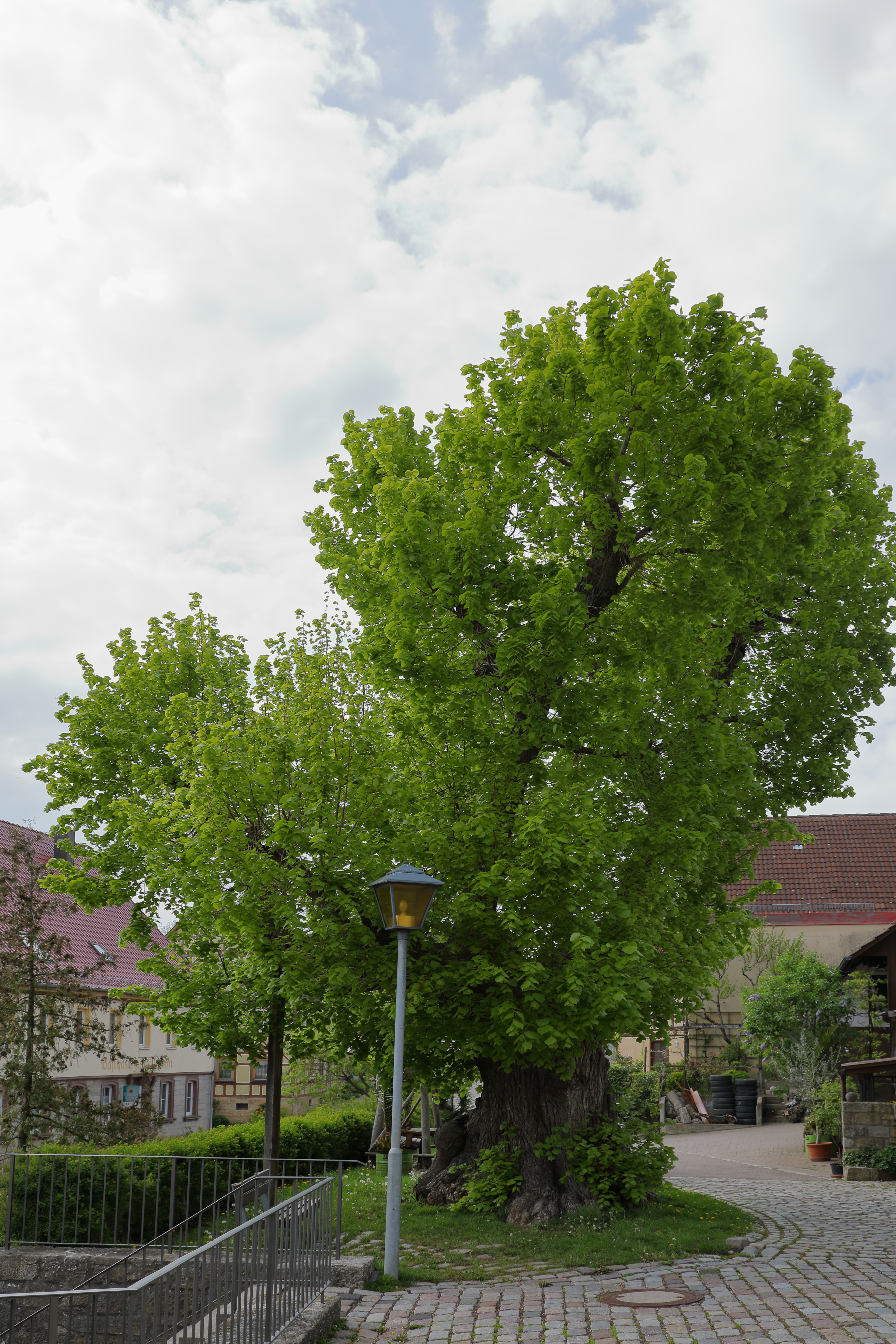 Das Einzelgebilde-Naturdenkmale 1 Linde im Ort im Niederstettener Ortsteil Wildentierbach mit der ID 81280820014.